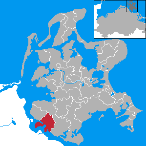 Gustow, Landkreis Rügen, Mecklenburg-Vorpommern